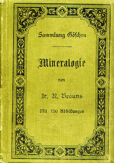 Sammlung Göschen Mineralogie von Dr. R. Brauns Professor an der Universität Gießen. Mit 130 Abbildungen Zweite vermehrte und verbesserte Auflage Zweiter Abdruck Leipzig G. I. Göschen'sche Verlagshandlung.